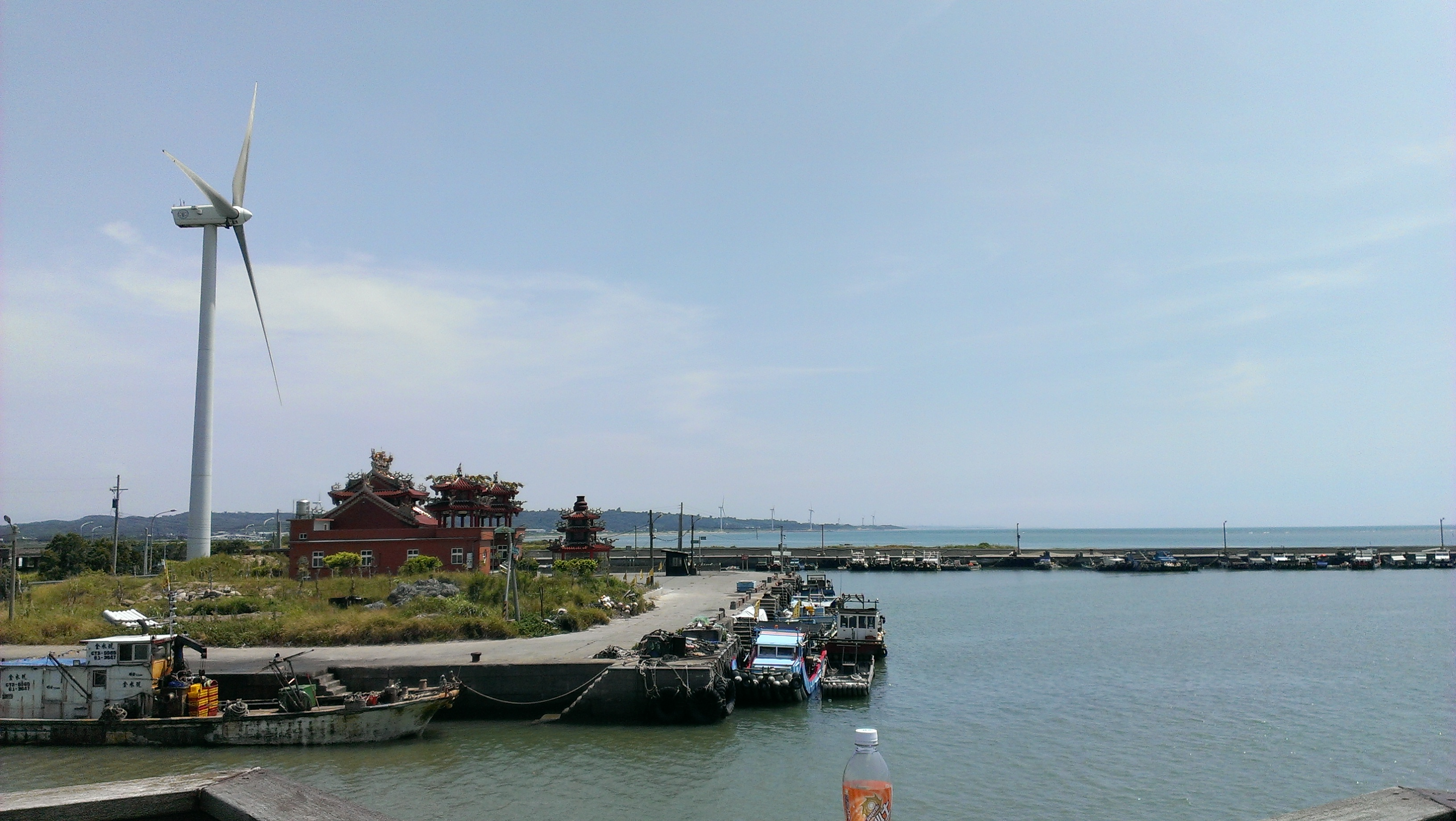 中文（台灣）: 海山漁港一景